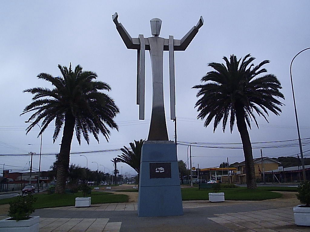 Estatua al patrono del puerto San Antonio de Padua Autor:Alstradiaan Fecha:Marzo de 2005 Fotografía tomada con una cámara digital Olympus camedia D-395 de 3.2 megapixeles Categoría:Chile (imagen)